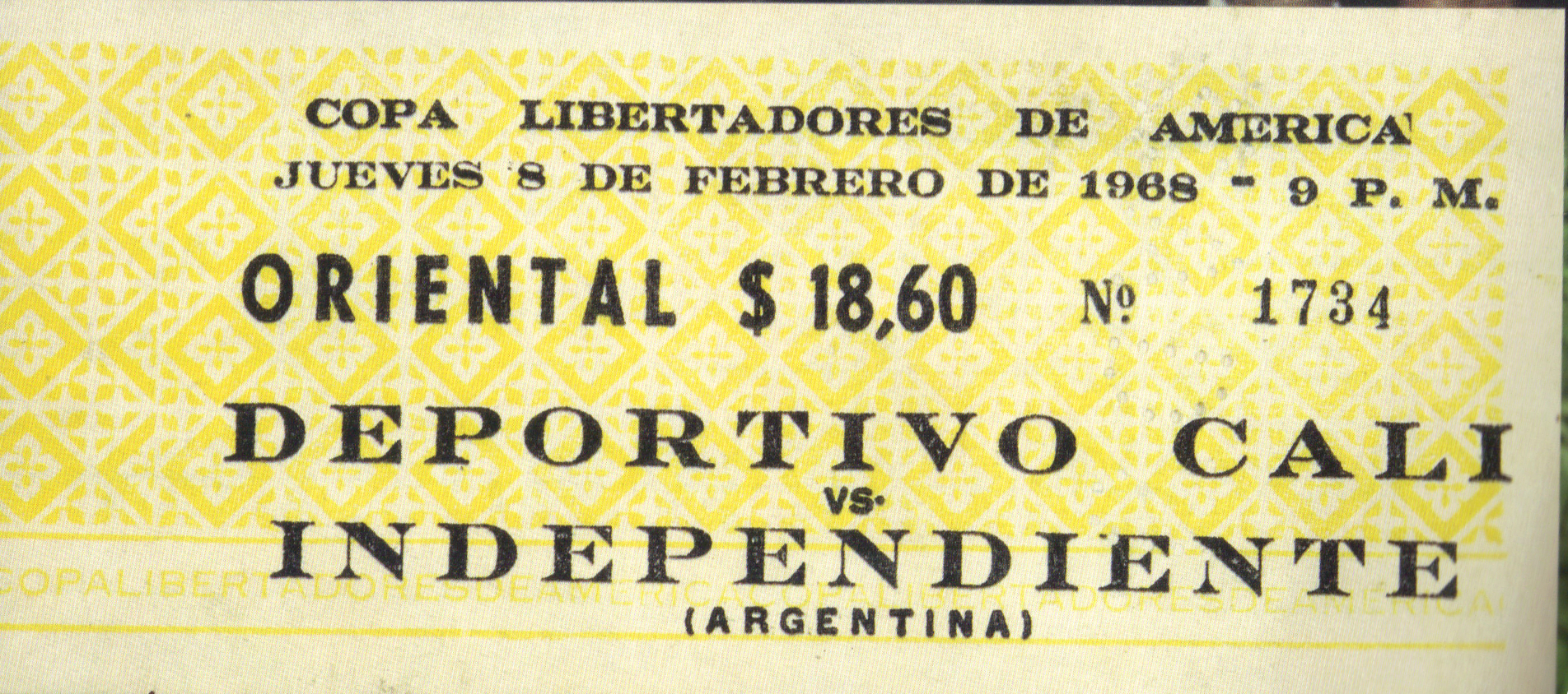 Debut del Deportivo Cali en la Copa Libertadores de América frente al Independiente de Avellaneda.